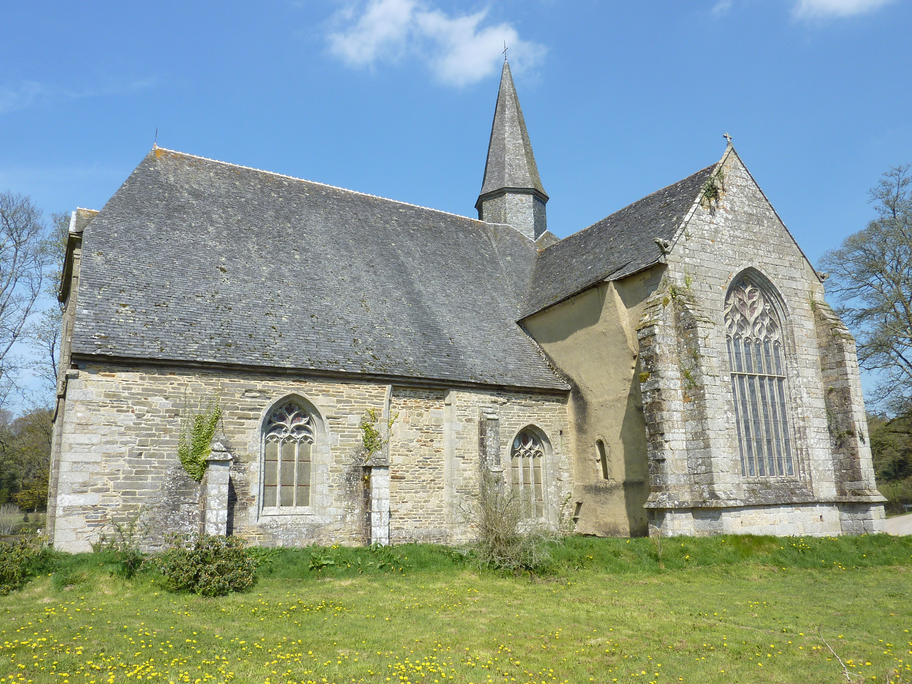 Abbaye du Relecq. Vue méridionale de l'église abbatiale.